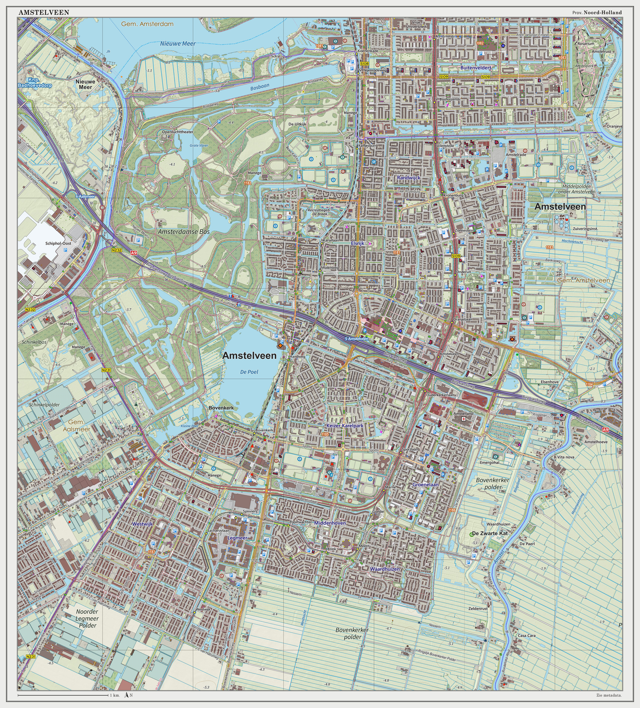 Topografische kaart van Amstelveen (woonplaats). Resolutie: 300 pixels/km. Kaartbeeld samengesteld uit de open geodata van de Top10NL en Top25namen (Basisregistratie Topografie, Kadaster), Creative Commons BY licentie. Gebouwvlakken uit open geodata BAG extract. Wegen uit de OpenStreetMap. Reliëfschaduw uit de Actuele Hoogtekaart AHN2. Samenstelling en kleurenschema: Jan-Willem van Aalst, met QGIS2. Zie ook de Legenda.